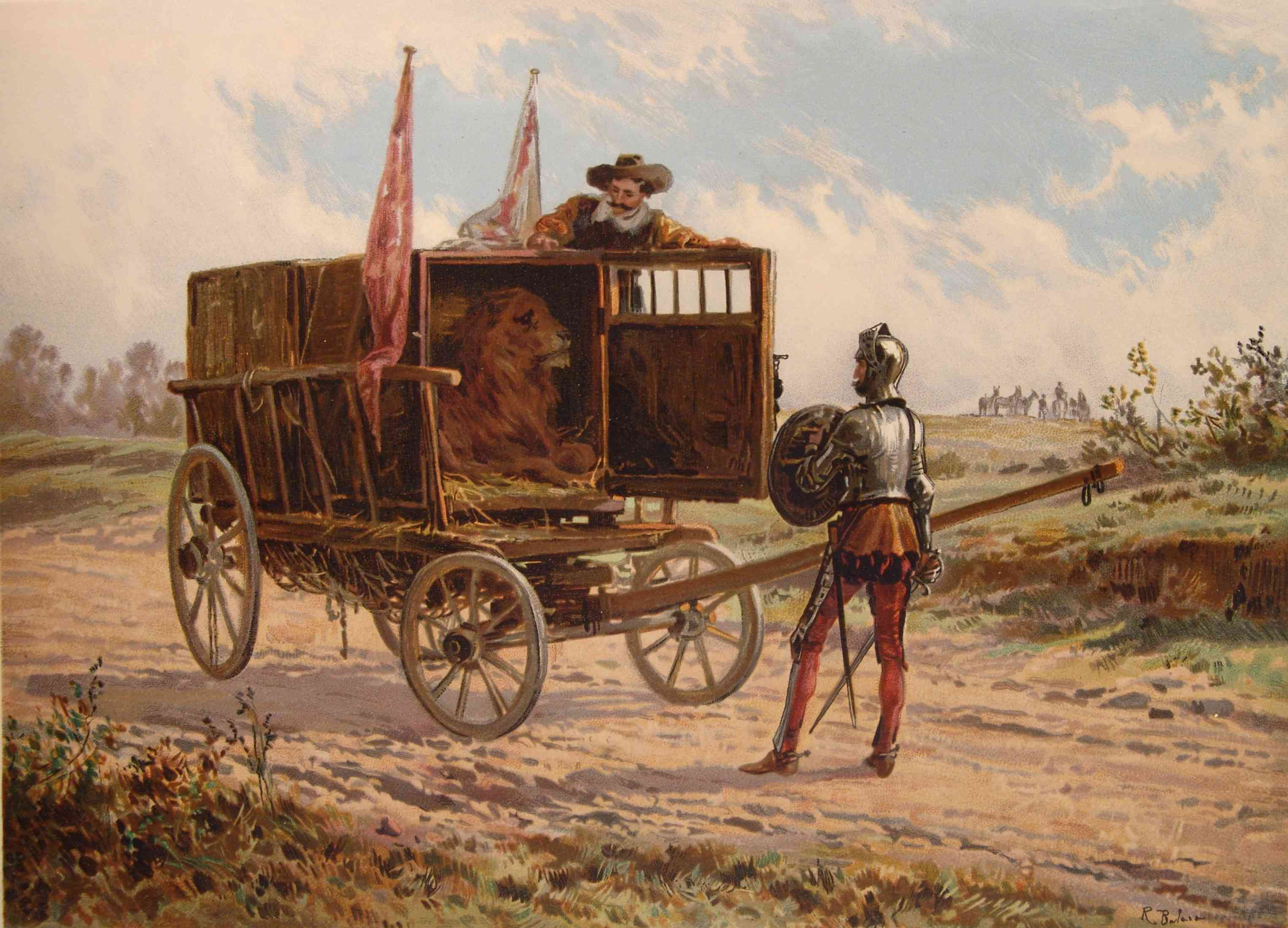 202_169_quijote_cap17